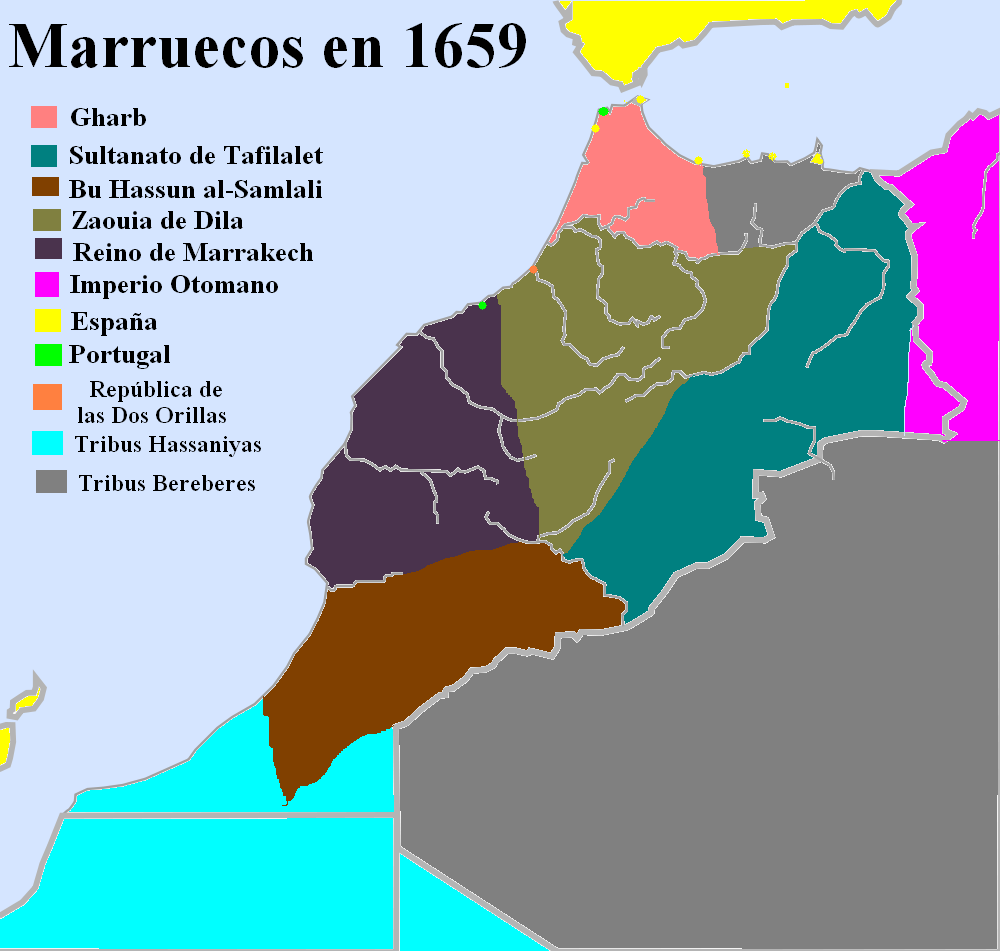 Mapa de Morocco en 1659